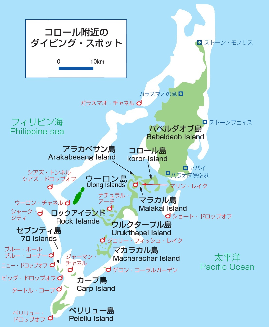 ガラスマオの滝の地図